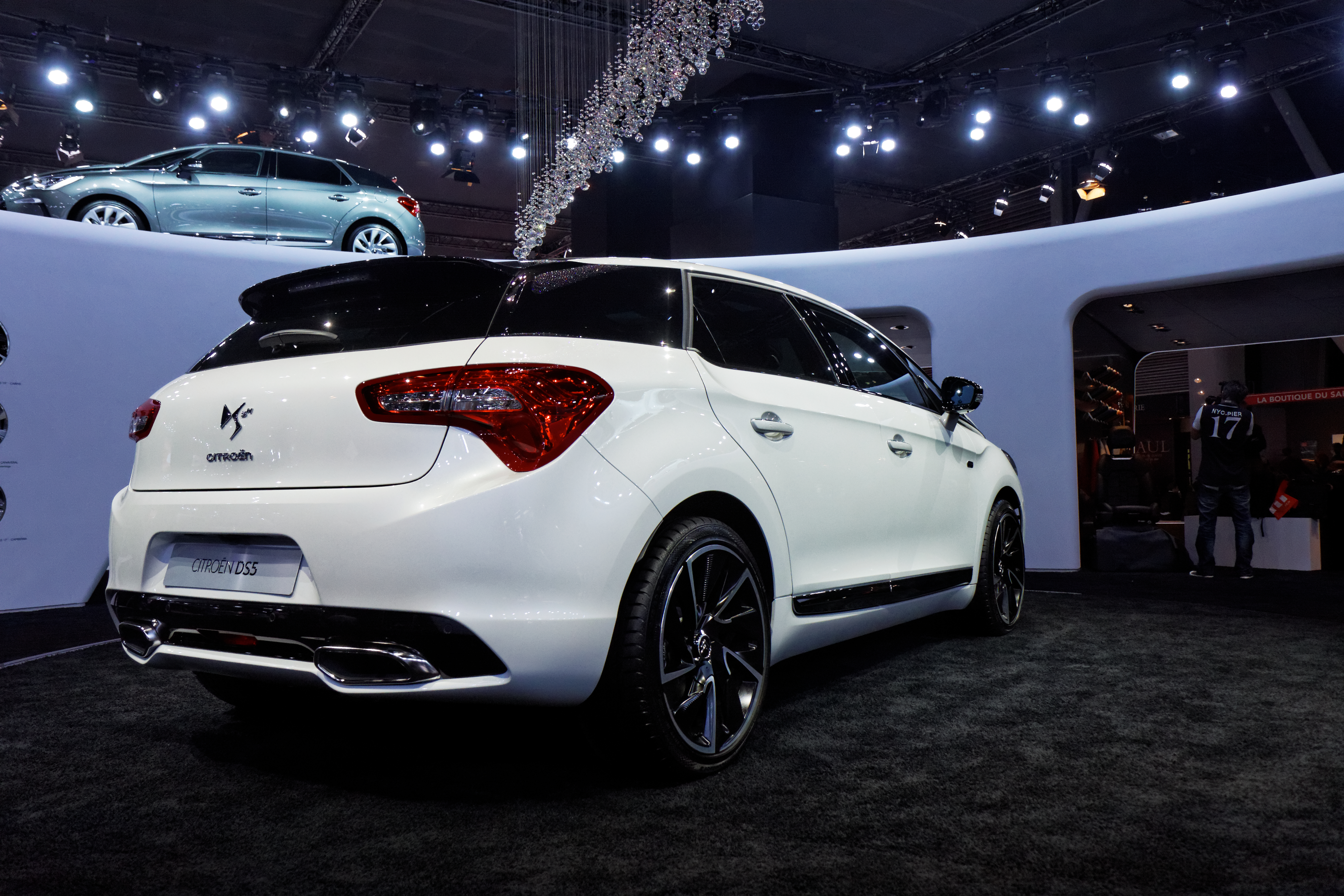 Une Citroën DS5 présentée lors du Mondial de l'Automobile de Paris 2012.